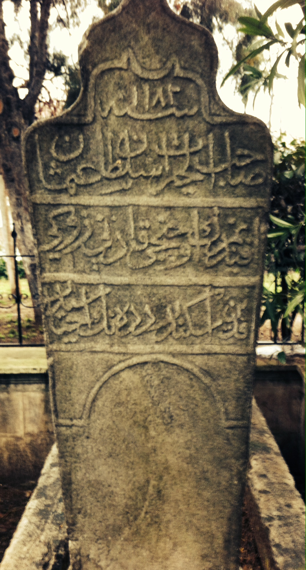 Zevki Kadın Namazgahı-Kıble Taşı Eyüp